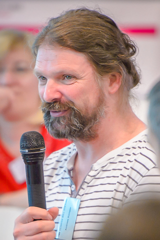 Andreas Kemper (Autor und Soziologe, Münster), Foto